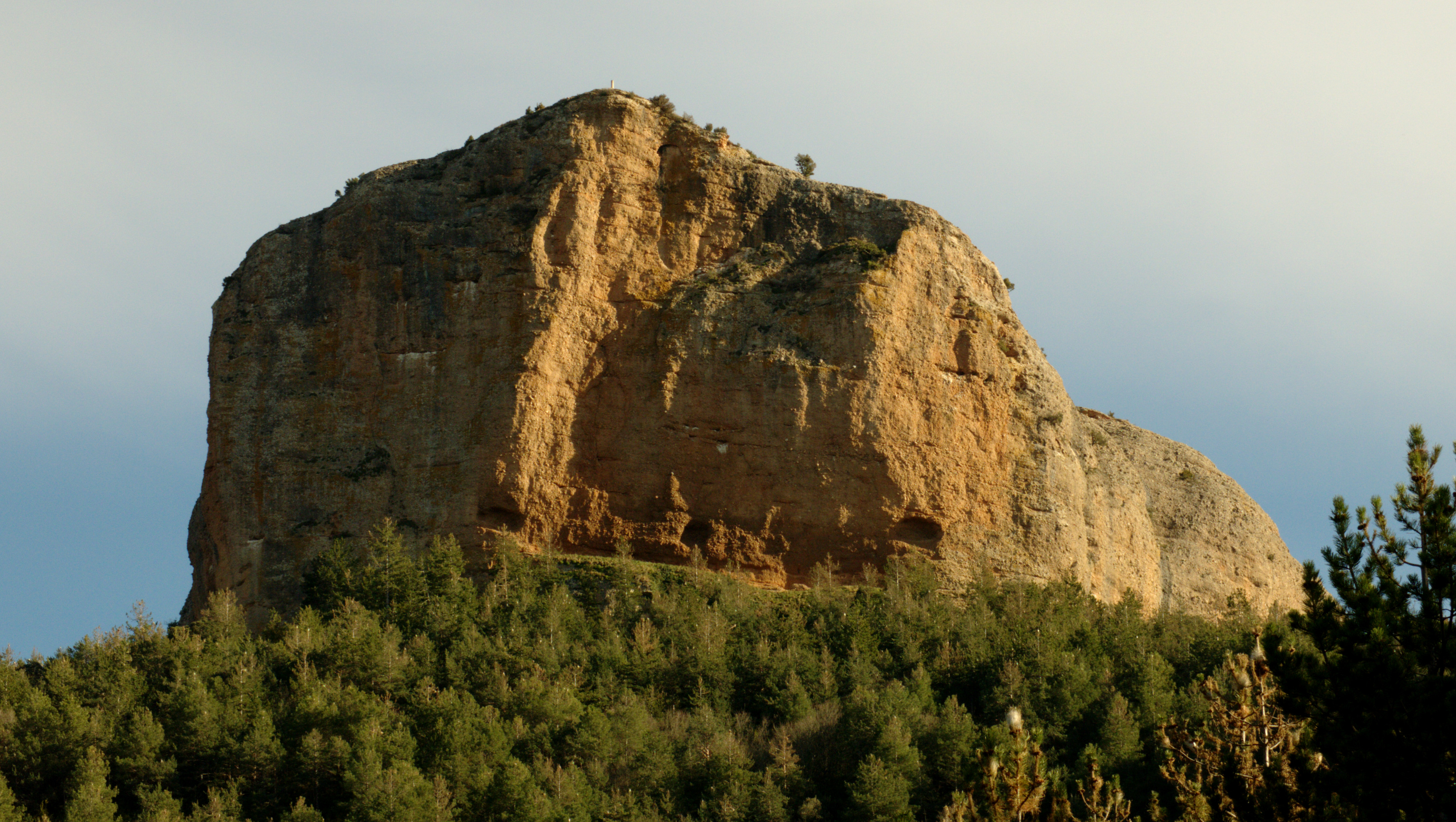 La serra del castell de Llaguarres està situada a la Baixa Ribagorça d'Aragó. Separa la Vall de l'Isàvena del voltant de Benavarri. L'altura màxima d'aquesta serra és de 1.150 metres. La seua direcció: oest-est, des de Graus a la serra de l'Ametllera.